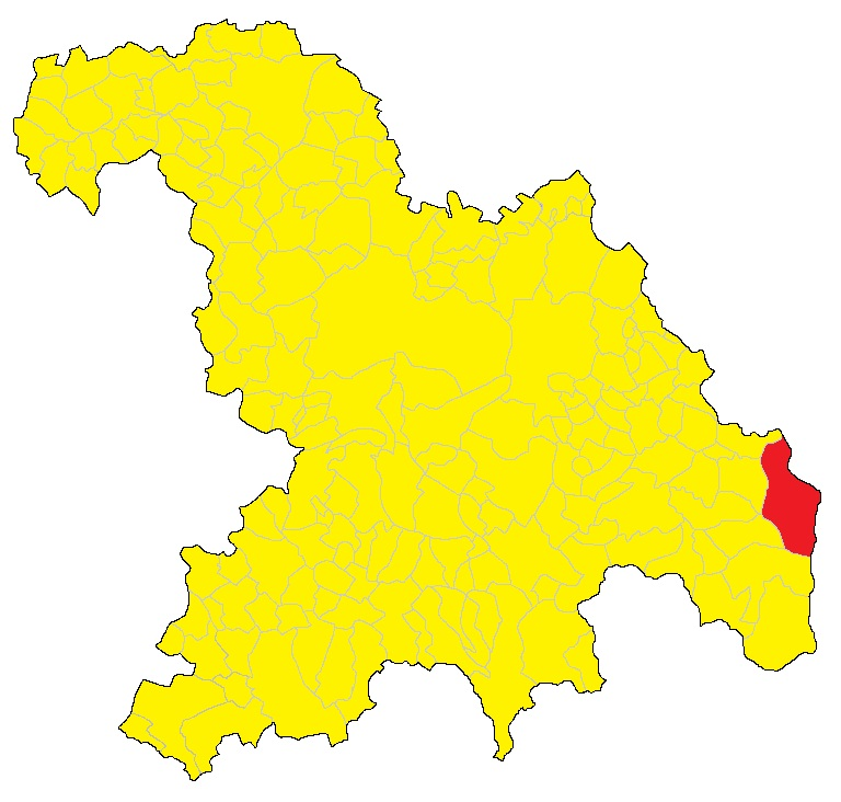 Mappa del comune di Fabbrica Curone (AL)